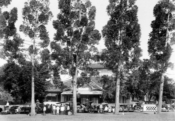 Negatief. Bruidsstoet voor de moskee te Sukabumi, West-Java